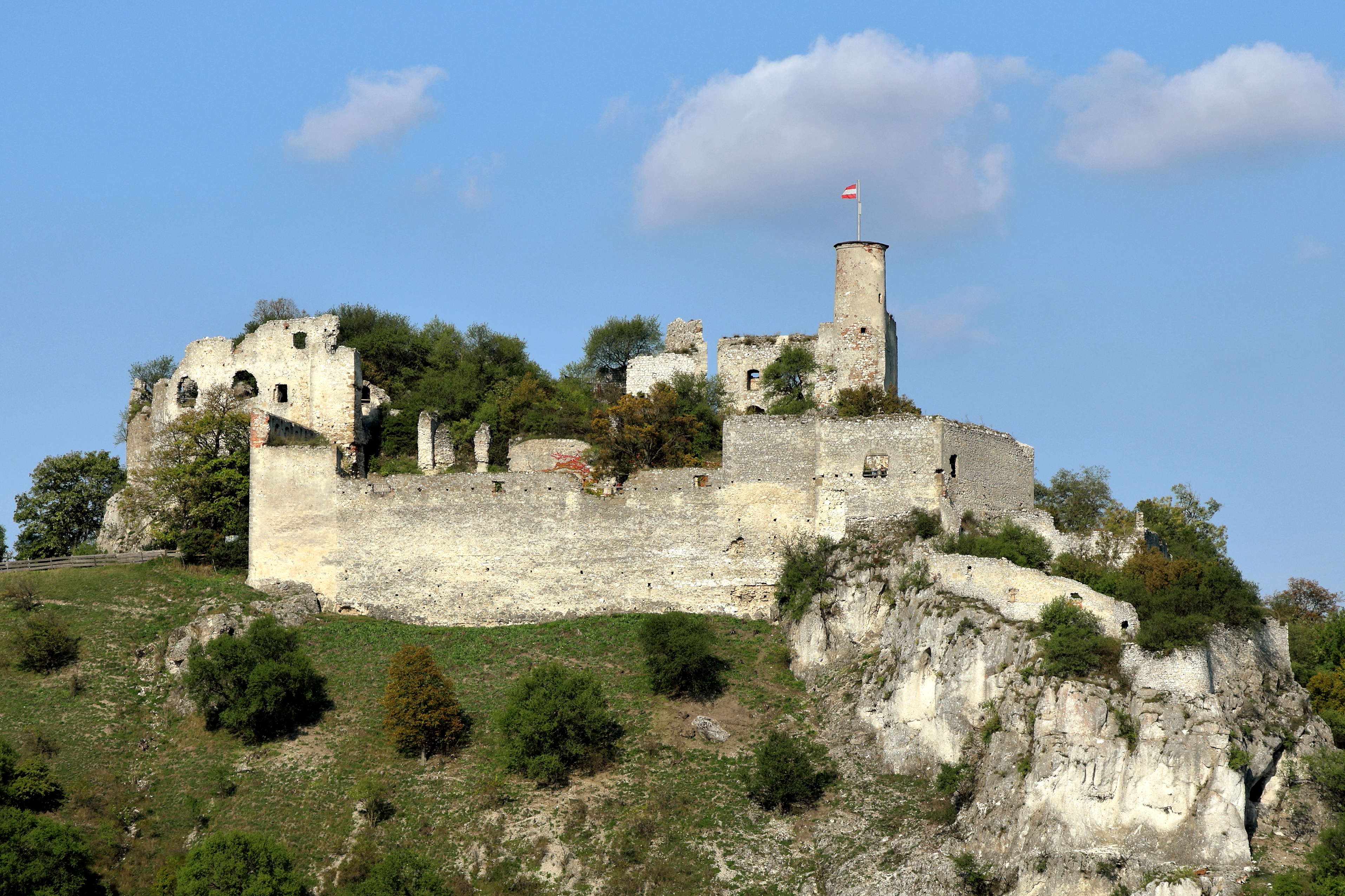 Südwestansicht der Burg Falkenstein in der niederösterreichischen Marktgemeinde Falkenstein.Die Burg wurde auf einer Kalkklippe nordwestlich des Ortes vermutlich um 1050 errichtet und in mehreren Bauphasen erweitert. Ab Ende des 16. Jahrhundert wurde sie zu einem „Bergschloss“ umgebaut. 1645 erfolgte die Eroberung durch die Schweden im Zuge des Dreißigjährigen Krieges. Später wurde die Burg bis zur Abmauerung des Burgtores um 1820 als „Steinbruch“ für billiges Baumaterial genutzt.